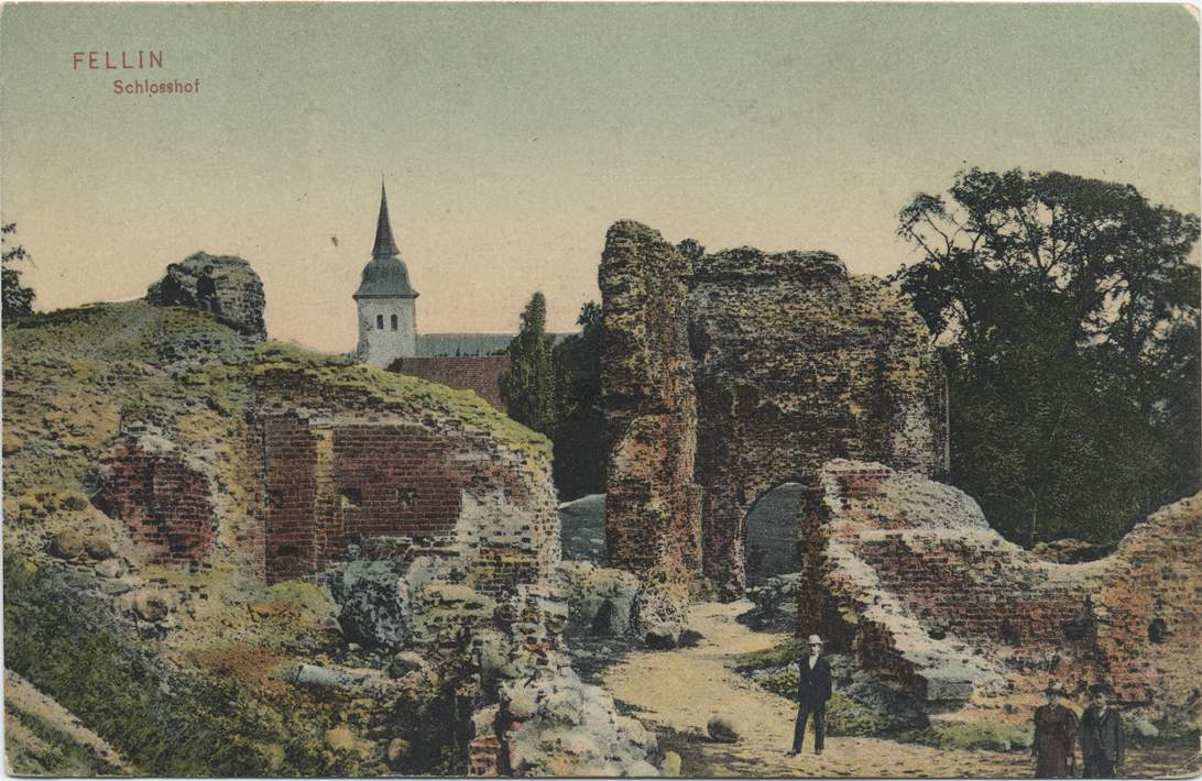 Postkaardil on kujutatud Viljandi kaevumäge, kus asetseb ordulinnuse pealinnus. Kirjastaja: Ernst Ring